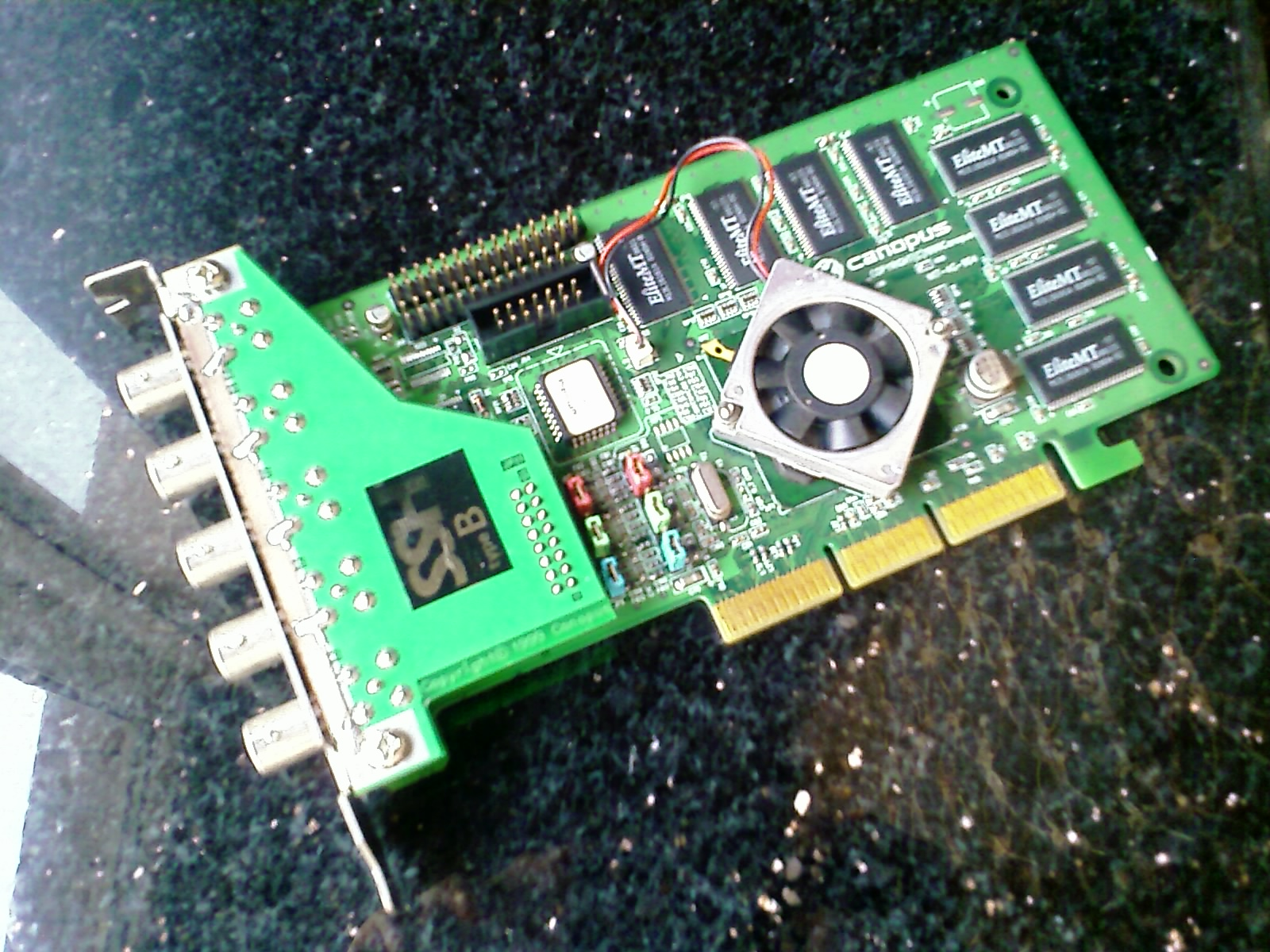 康能普視推出的TNT2 Ultra顯示卡